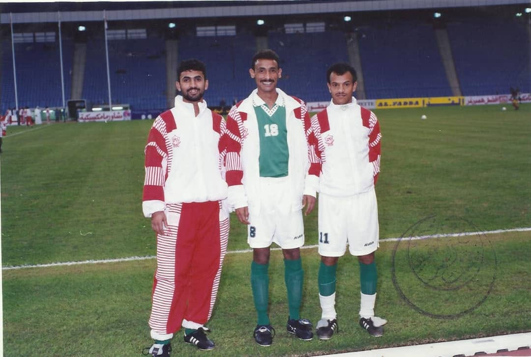 لاعب نادي شعب صنعاء -- الكابتن أسعد محمد عبده -لاعب نادي طليعة تعز - واللاعب عمر عبد الحفيظ - لاعب نادي الزهرة - واللاعب عبدالرحمن الجلال